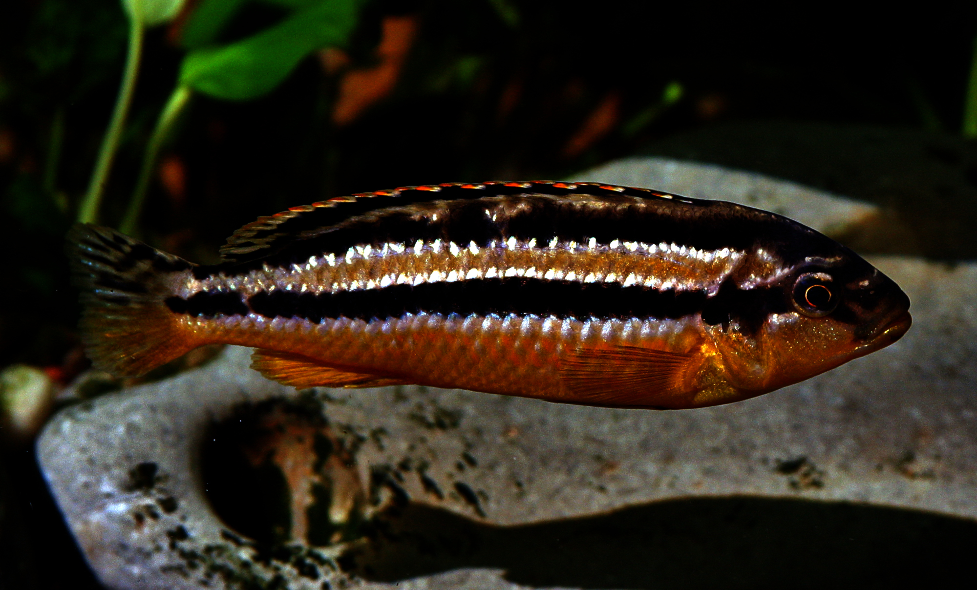 Melanochromis auratus (female)